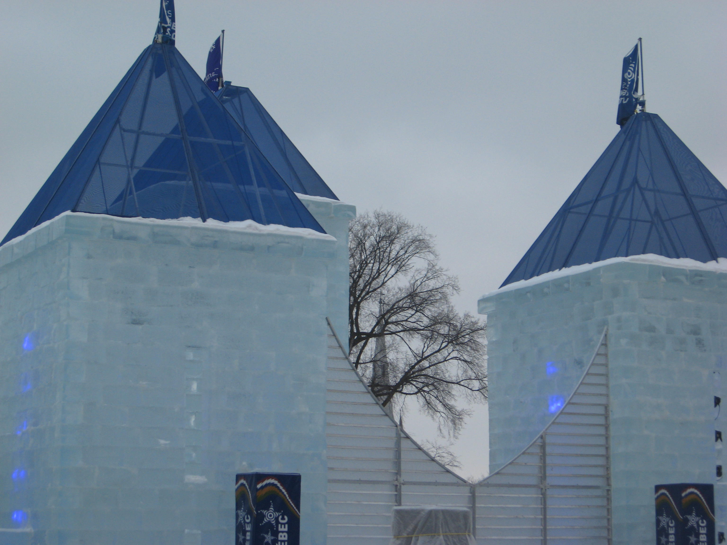 Le château de Bonhomme 2011.